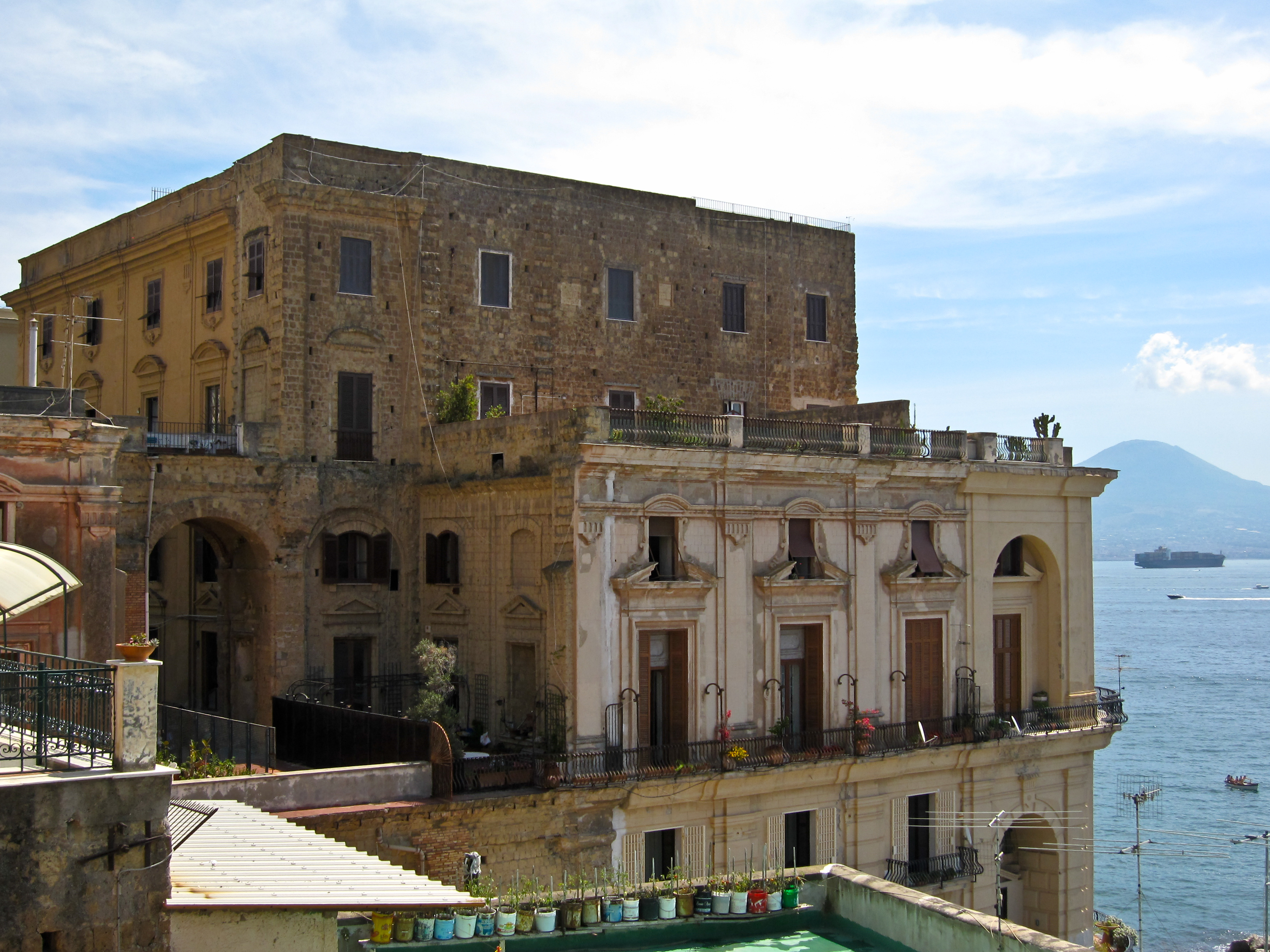 Passeggiando e osservando. La parte alta di Palazzo Donn'Anna vista dal lato meno conosciuto.